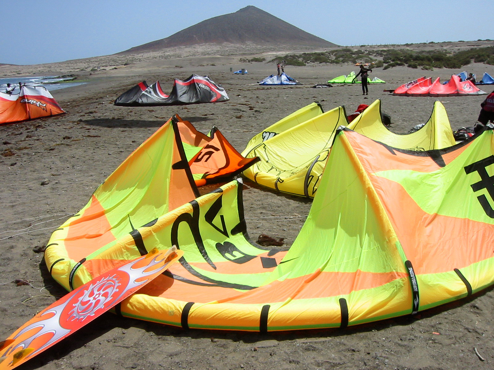 Playa de El Médano text from previous image (not put into Commons): Estos artefactos, a medias entre parapente y cometa, se han popularizado. Tienen un tubo que se hincha con aire y mantiene la rigidez a la vez que lo hace resistente a las caídas y poco peligroso.062